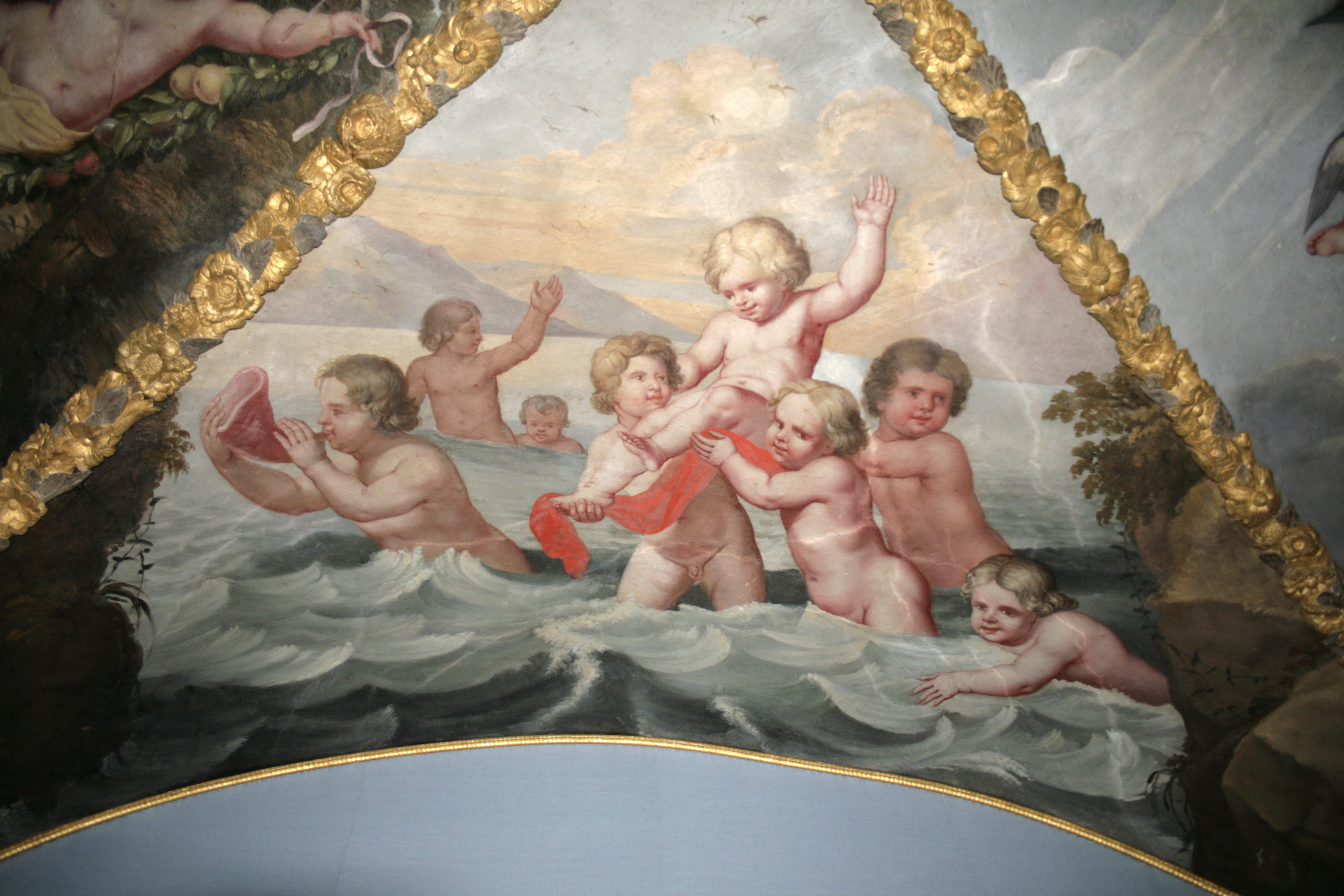 Deckengemälde im Schloss Hadamar, Deutschland